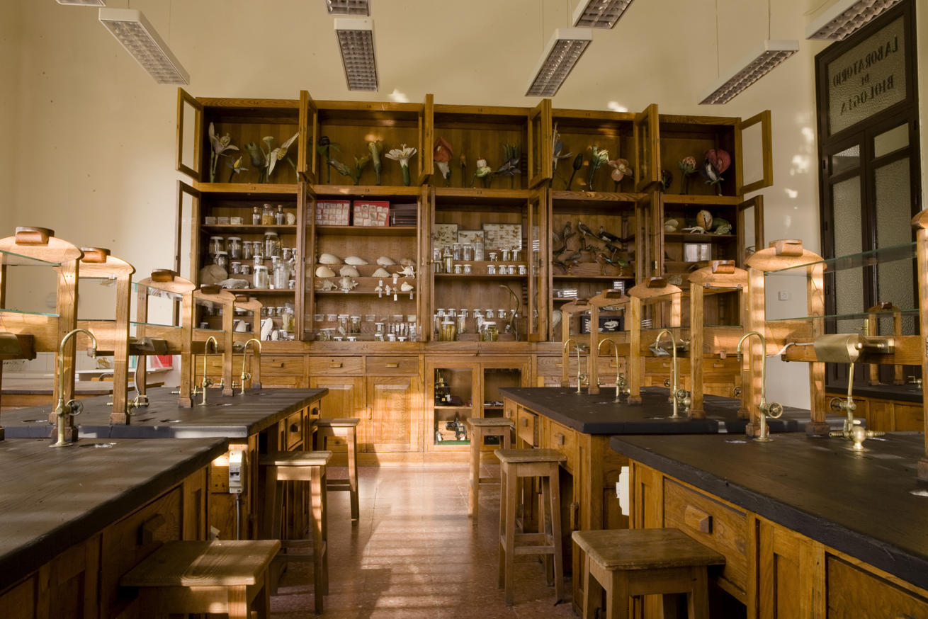 Laboratorio de Biología del Instituto-Escuela, Sección Retiro